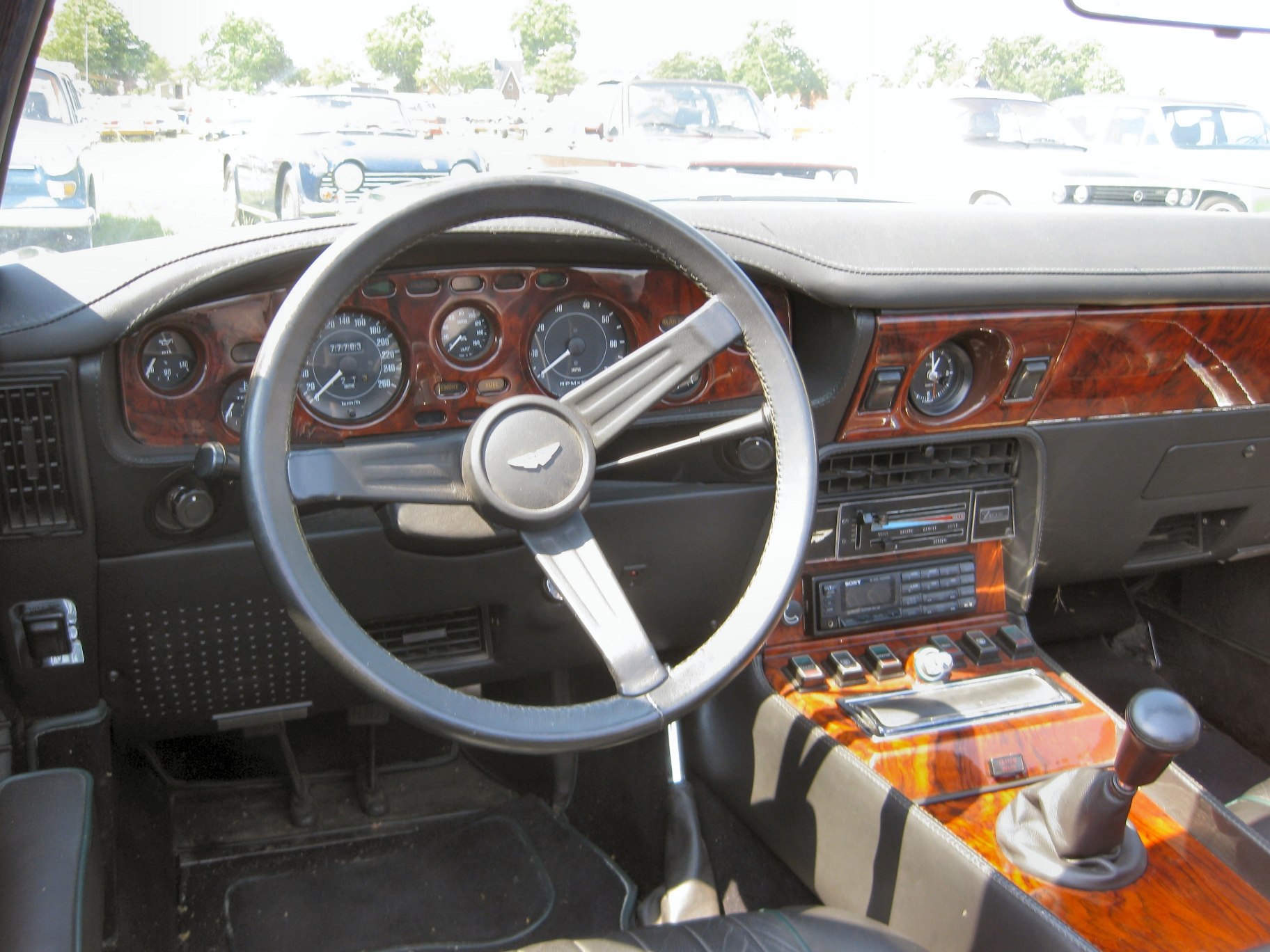 Aston Martin V8 Volante Cockpit